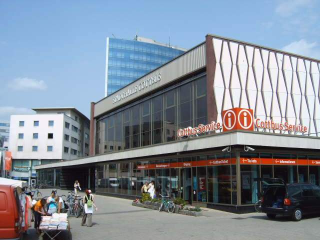 Stadthalle Cottbus, Bundesland Brandenburg, Deutschland Bild aufgenommen am 21.6.2006 durch Olaf Meister